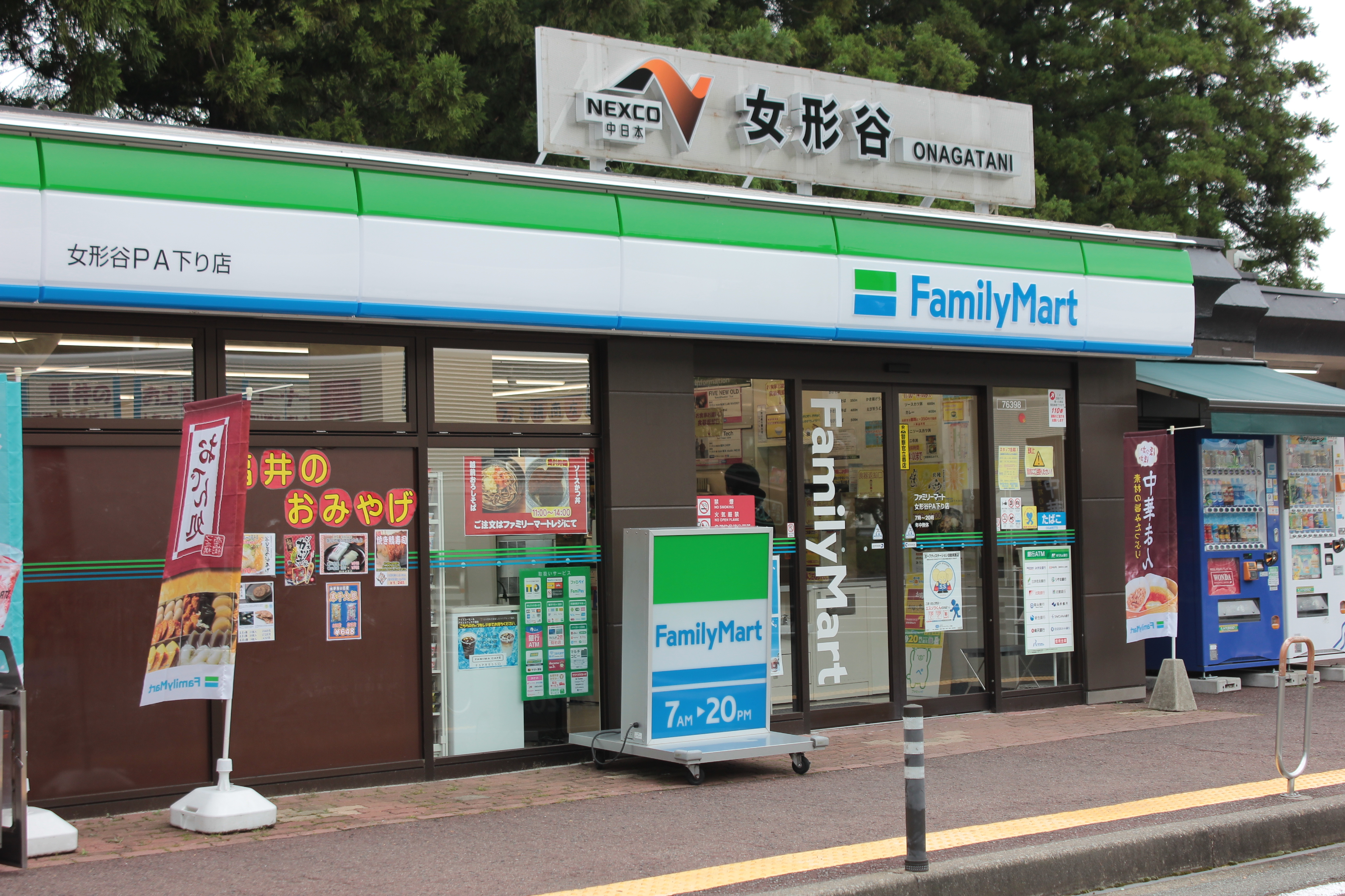 女形谷パーキングエリア下り（福井県坂井市） Canon EOS Kiss X5